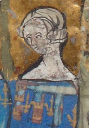 Blanche d’Artois, sœur de Robert d’Artois et mère de Jeanne de Navarre